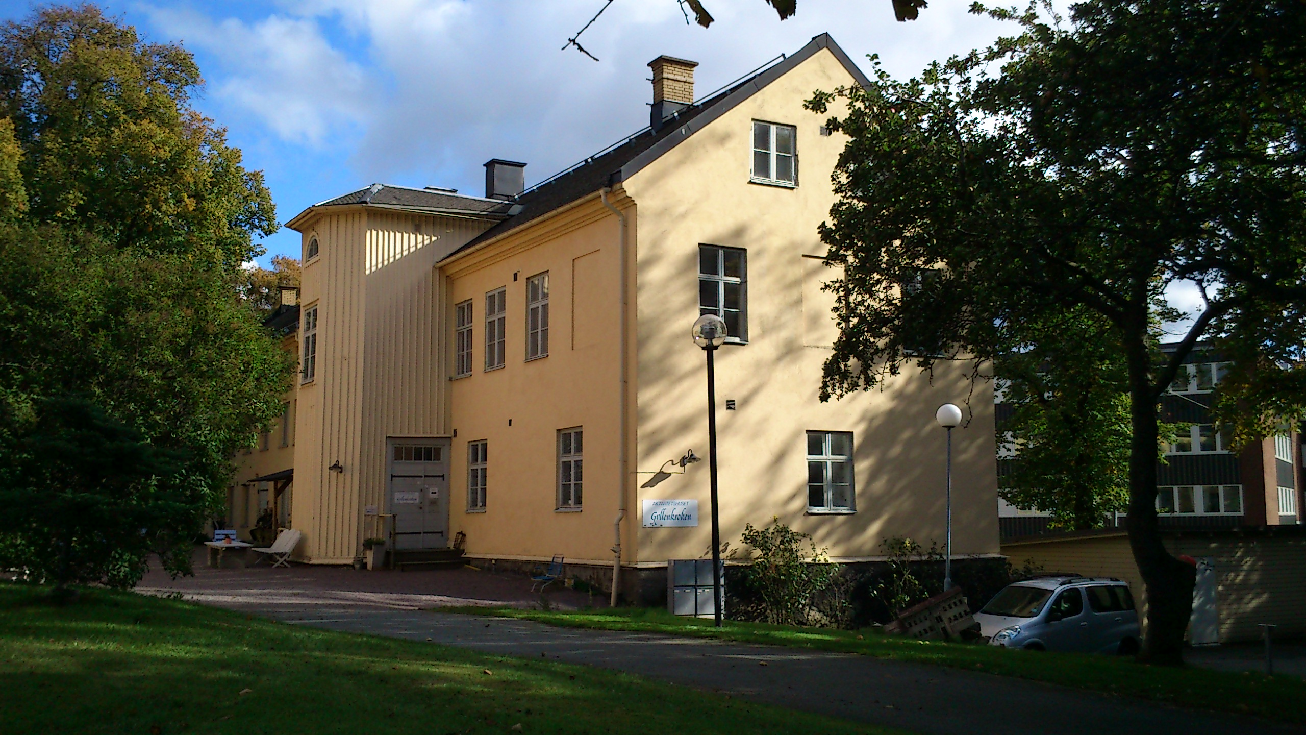 Göteborgs fd spinnhus (Stampen 20:2)